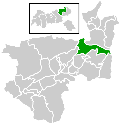 Lage der Gemeinde innerhalb des Bezirks Kufstein